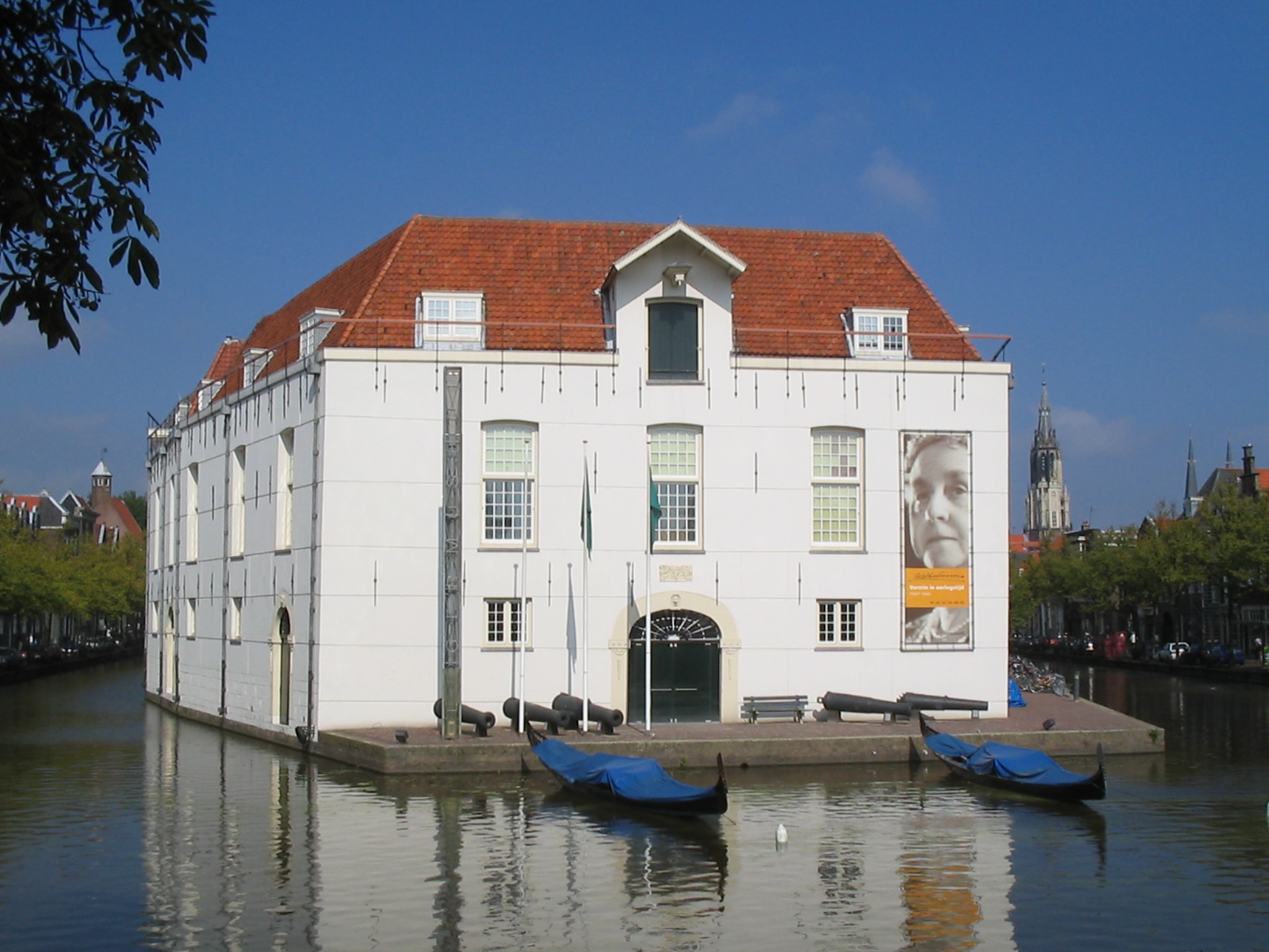 Legermuseum, Delft. Sept. 2005